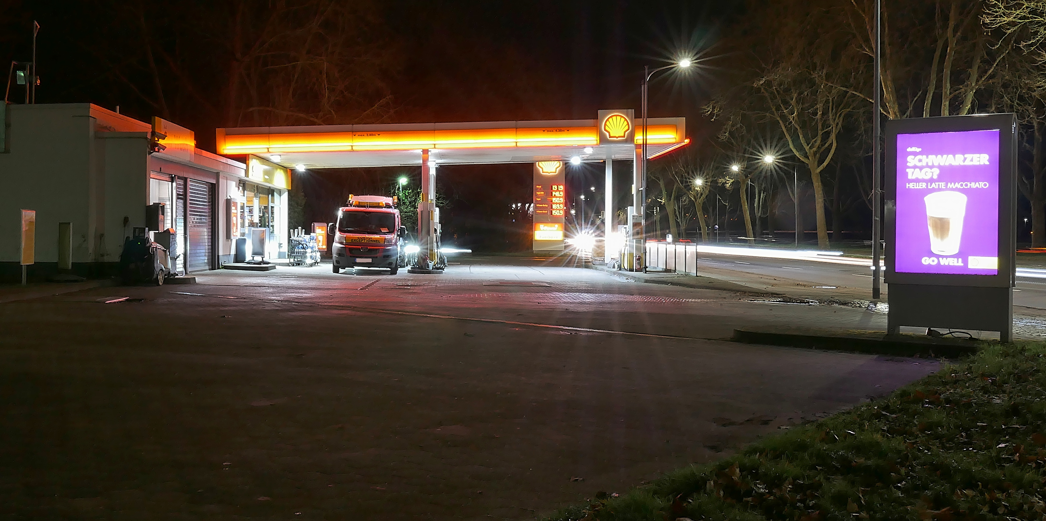 Trier - Shell-Tankstelle am Parcelliufer